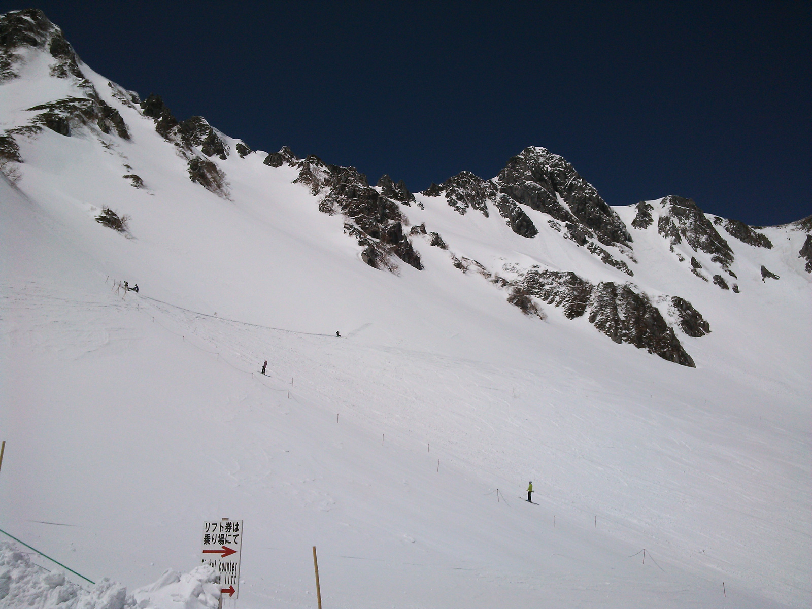 千畳敷スキー場のTバーリフトとゲレンデ